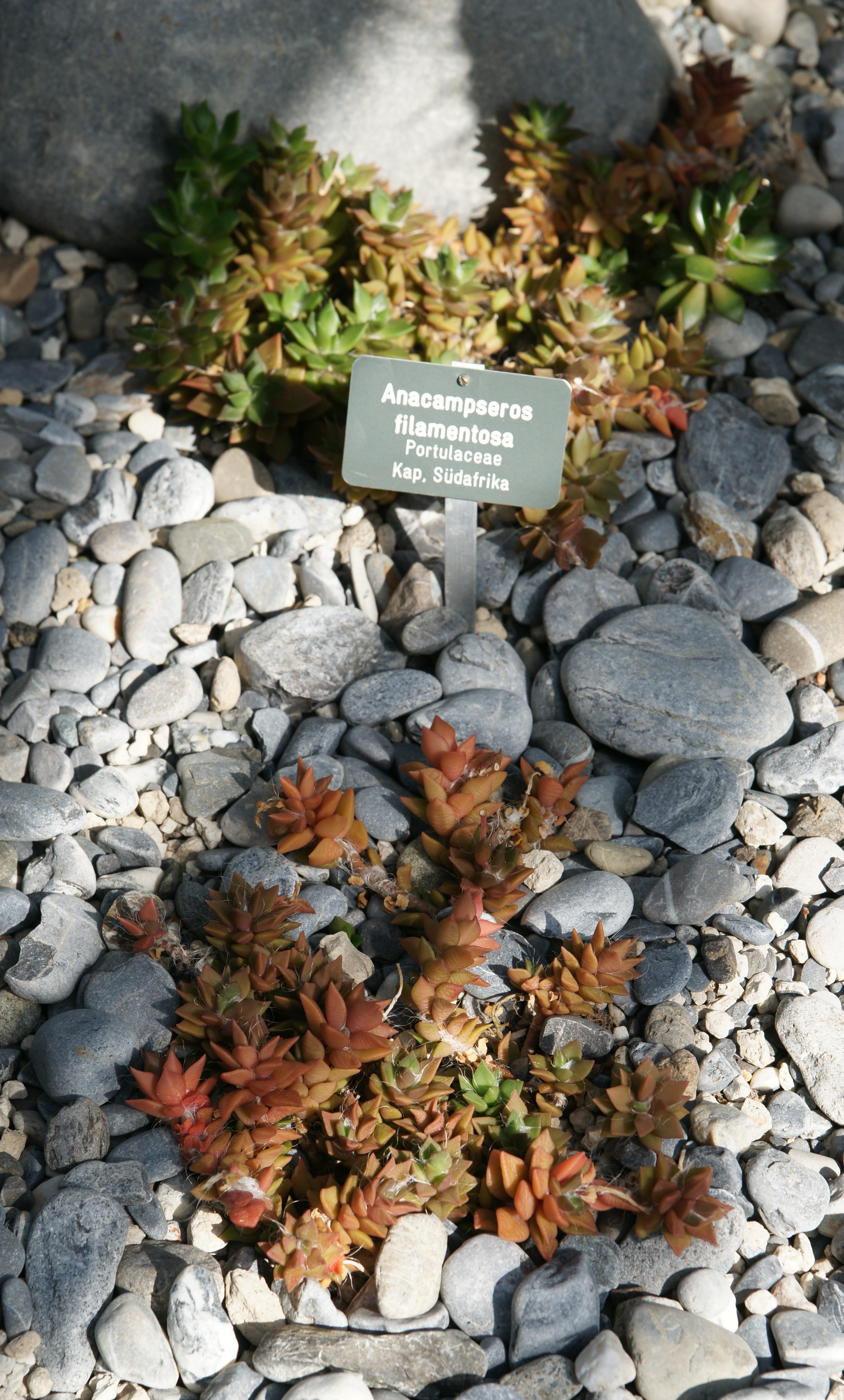 Anacampseros species mislabeled as Anacampseros filamentosa. Schauhaus der Stadtgärtnerei Bern, Elfenau.